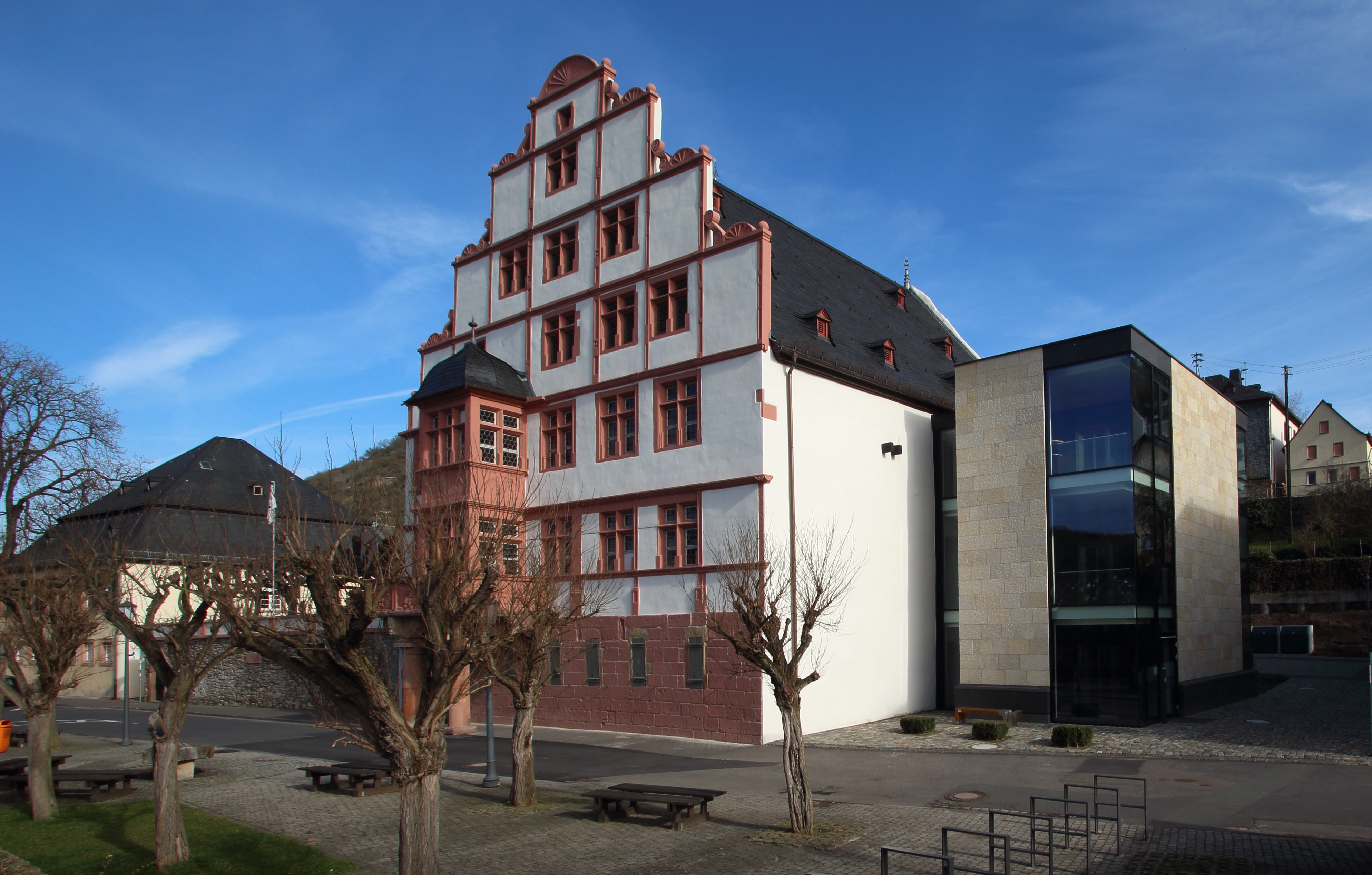 Hilchenhaus mit neuem Erschließungsanbau nach der grundlegenden Restaurierung 2009-2014. Lorch am Rhein, Rheingau